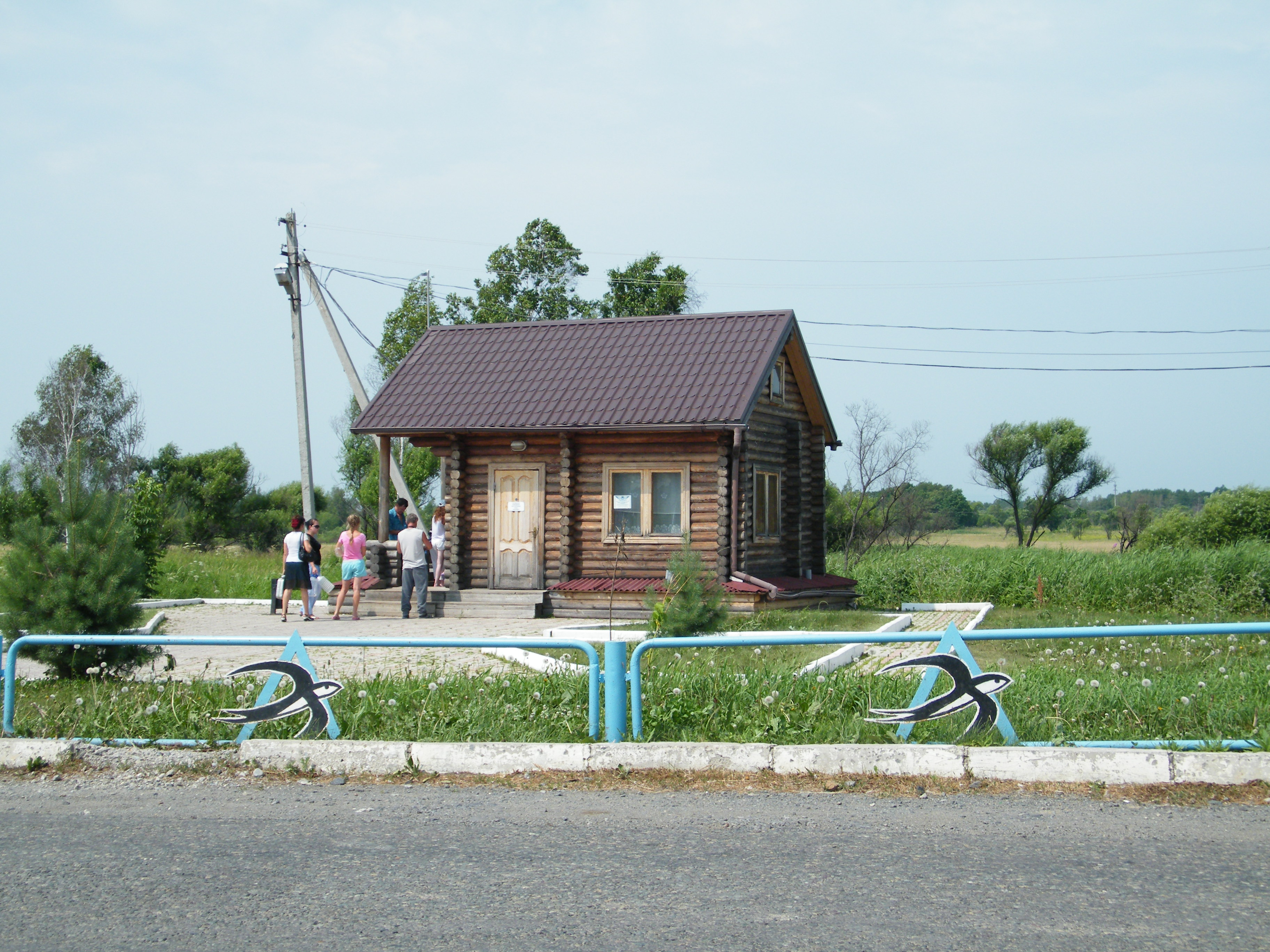 Источник минеральной воды "Ласточка" возле посёлка Лучегорск, Приморский край.